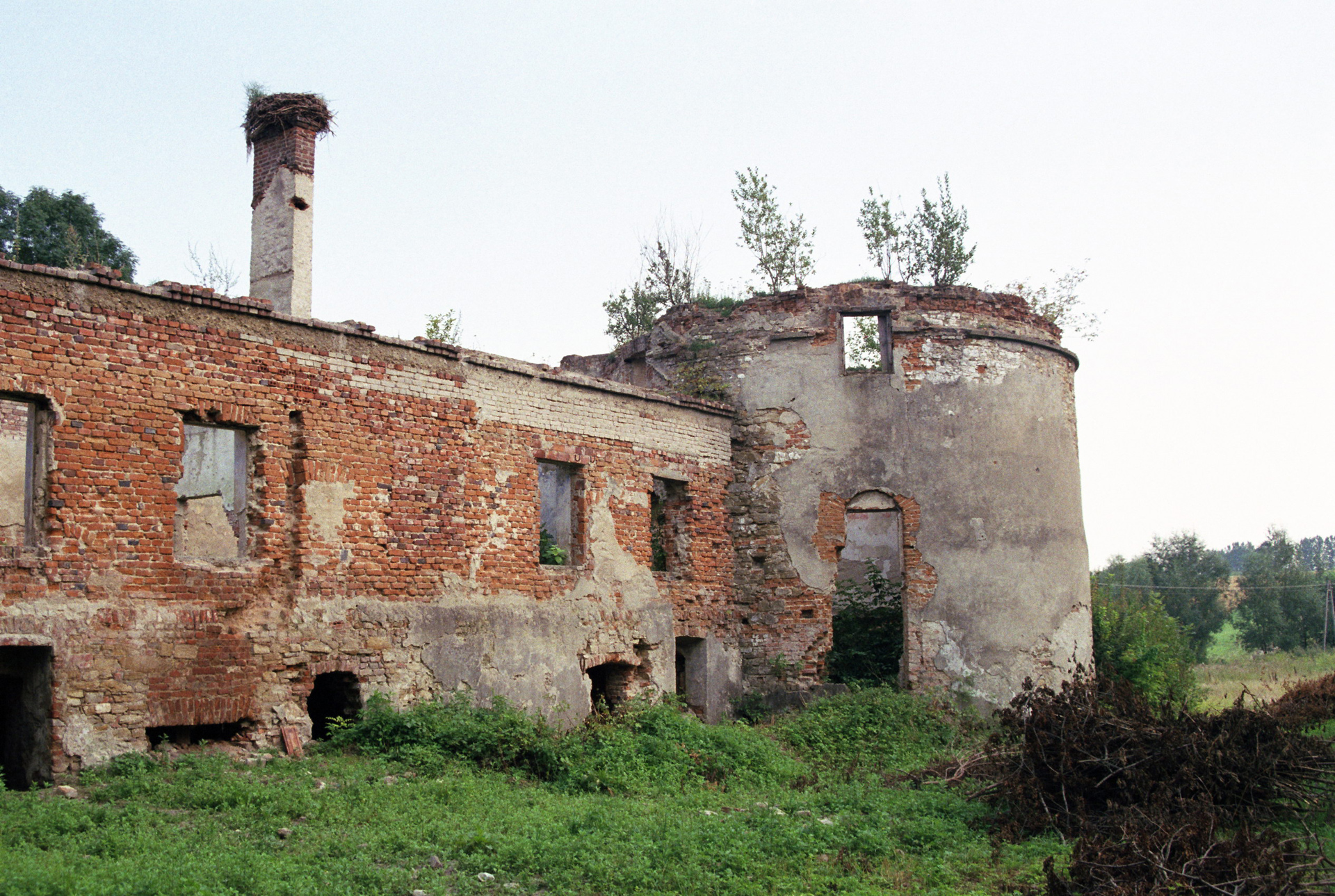 ruiny zamku Fredropol, Fredropol 02.1986.